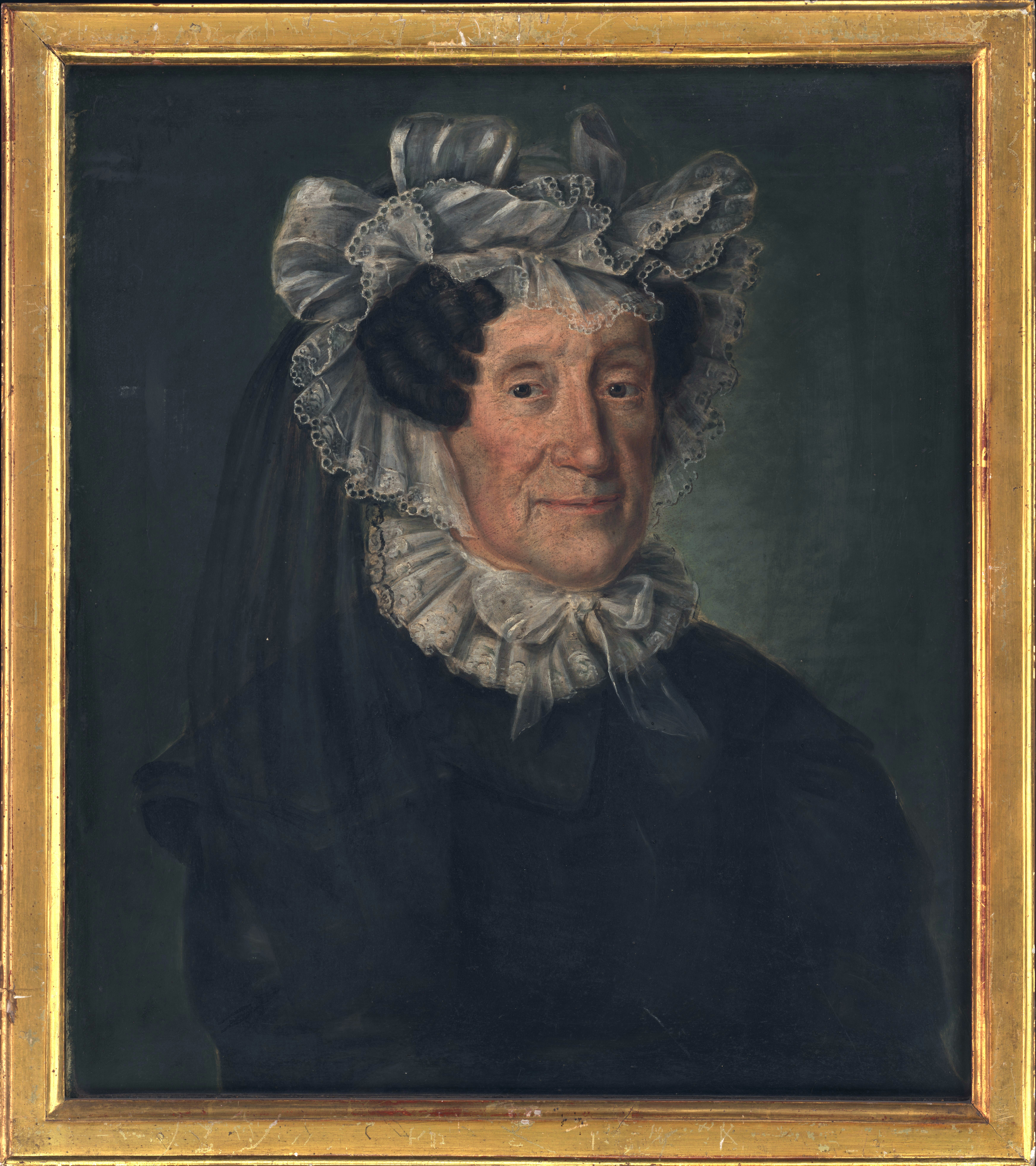 Brustbildnis von Anna Elisabetha Zürcher-Hirzel, Ehefrau von Jakob Zürcher, Öl auf Leinwand, 58 x 51 cm